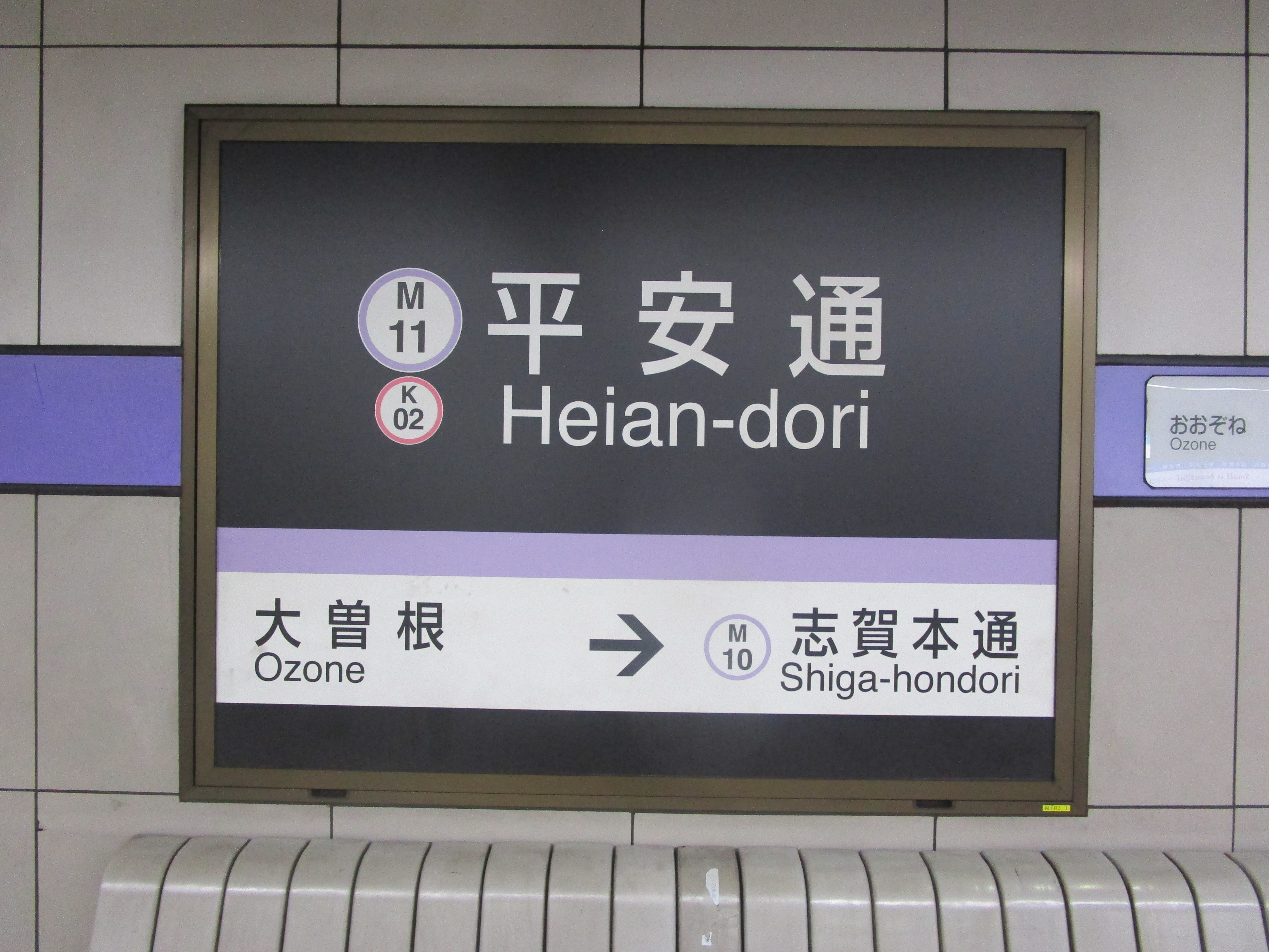 名城線平安通駅の駅名標